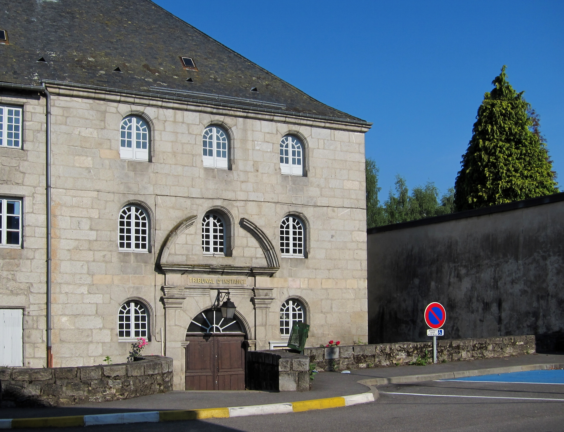 Le tribunal d'instance à Ussel (Corrèze).